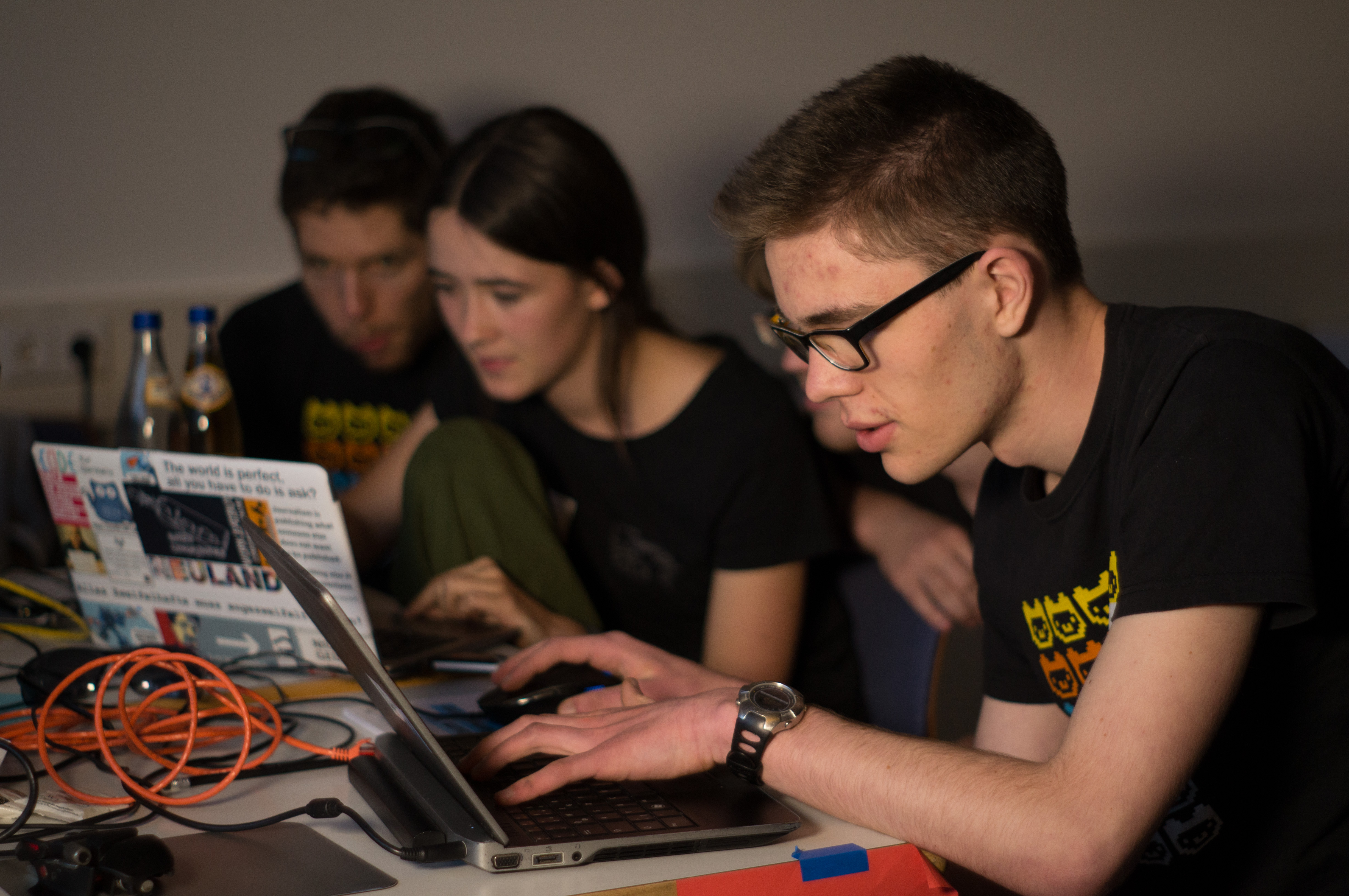 CC-BY 4.0 Jugend hackt, Foto: Eva-Maria Kühling